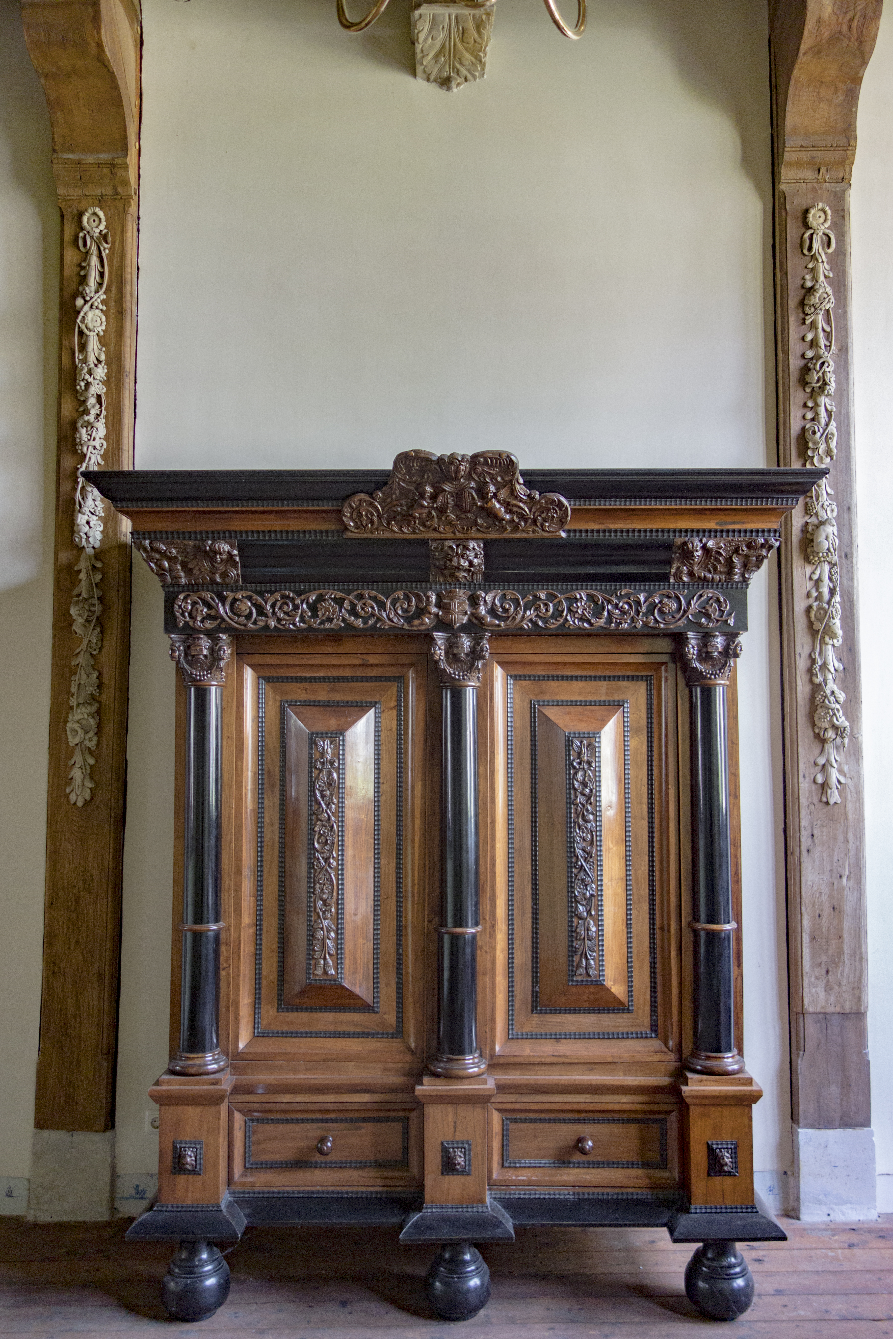 Kast in de keuken van Binnenluiendijk 3.